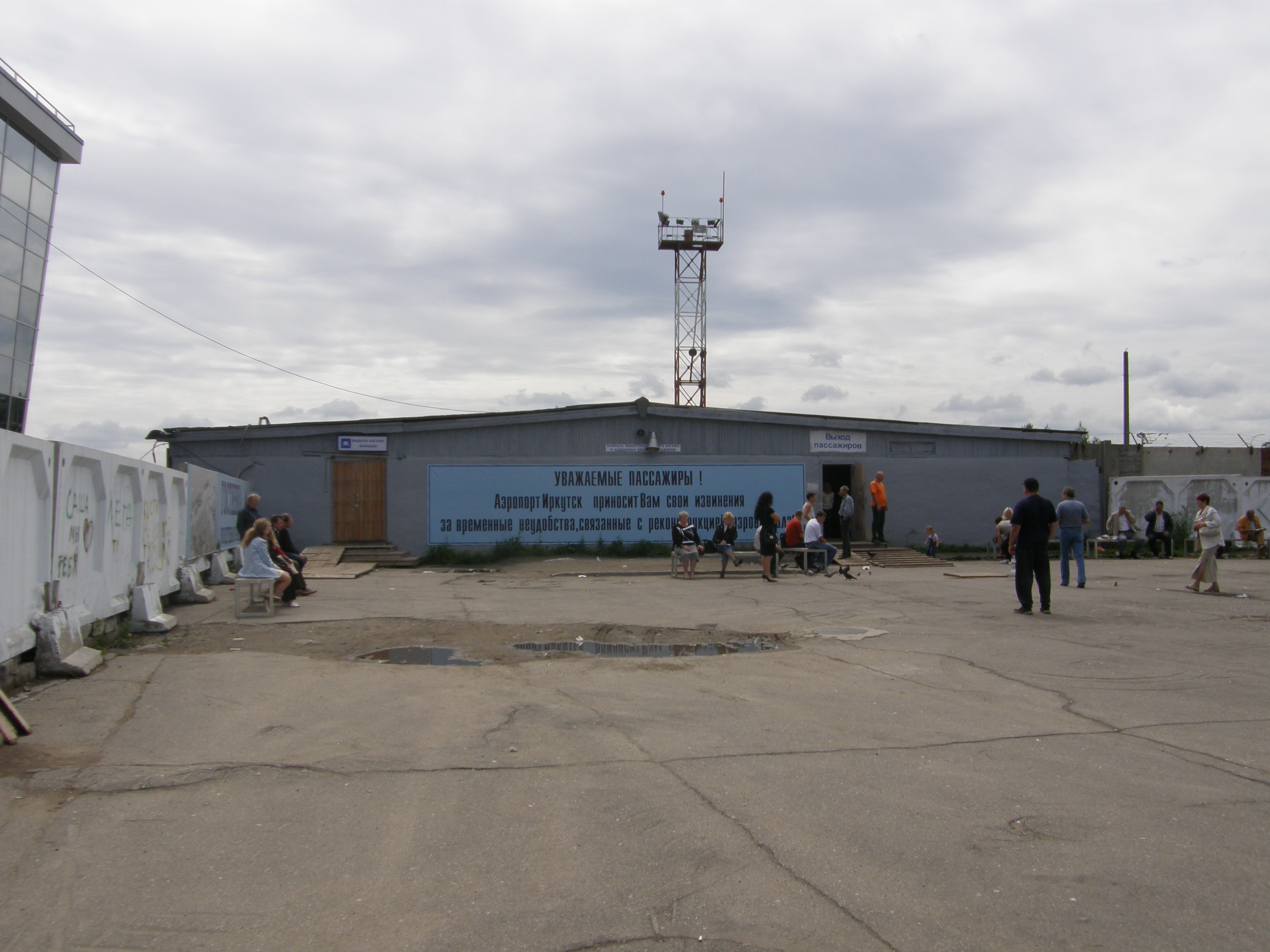 Временный зал прилета Иркутского аэропорта Auxiliaryterminal during reconstruction of the domesticterminal